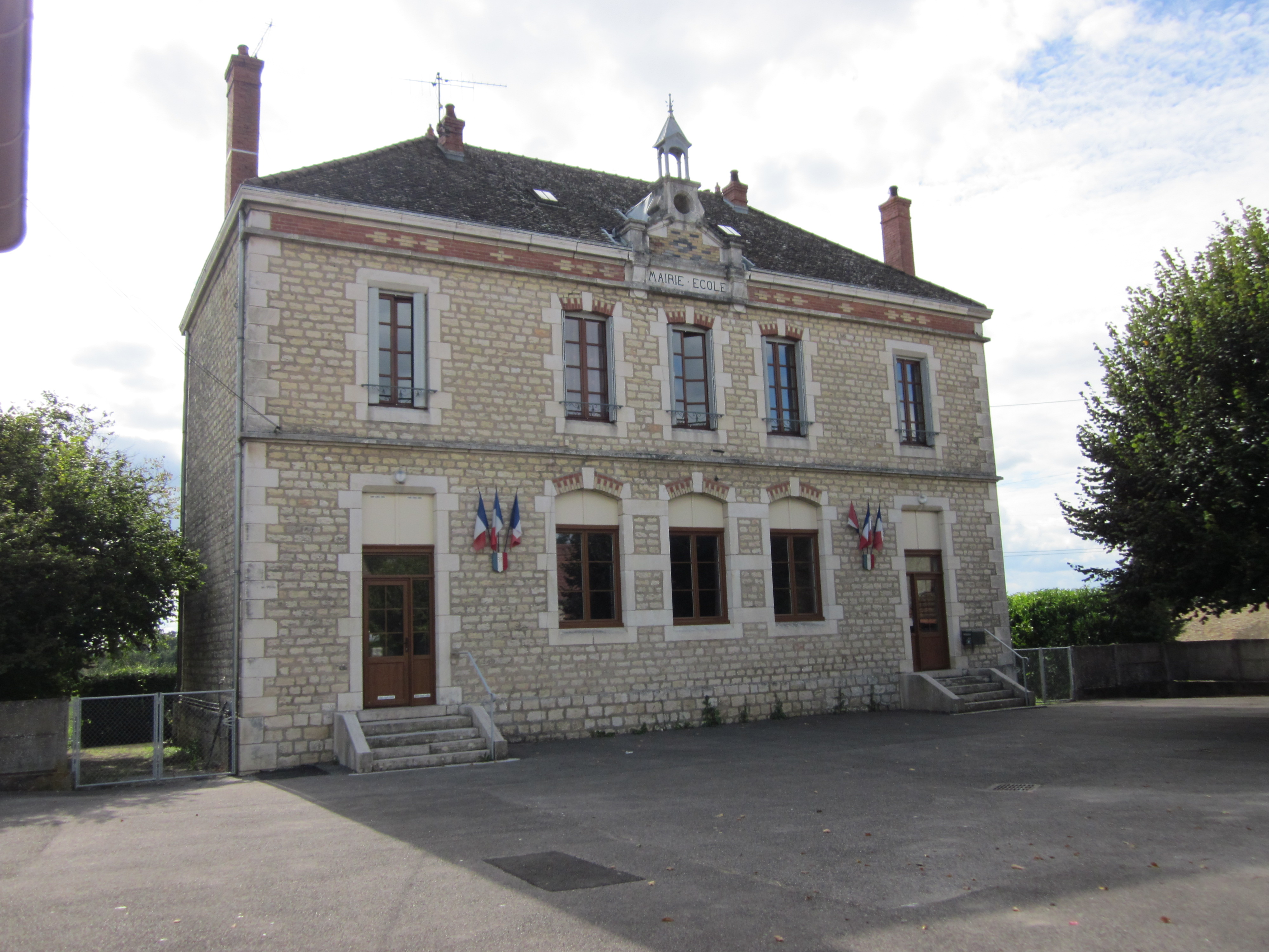 Mairie-école de Palleau (Saône-et-Loire)